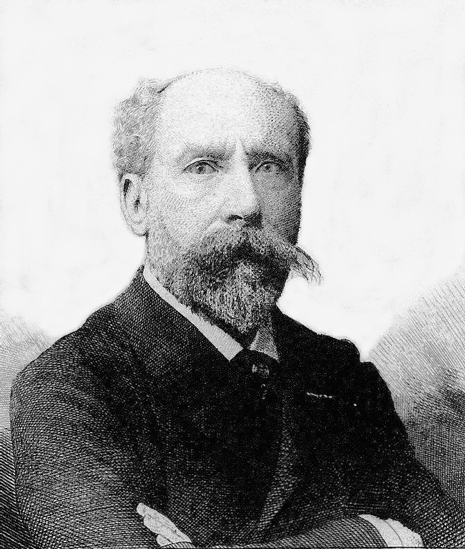 Jean Lahor (pseudonyme d'Henri Cazalis), portrait en frontispice, gravé par Ricardo de Los Rios (1846-1929), in Œuvres de Jean Lahor : L'Illusion, Paris, Alphonse Lemerre, Ve édition, s.d. [1906 ?].